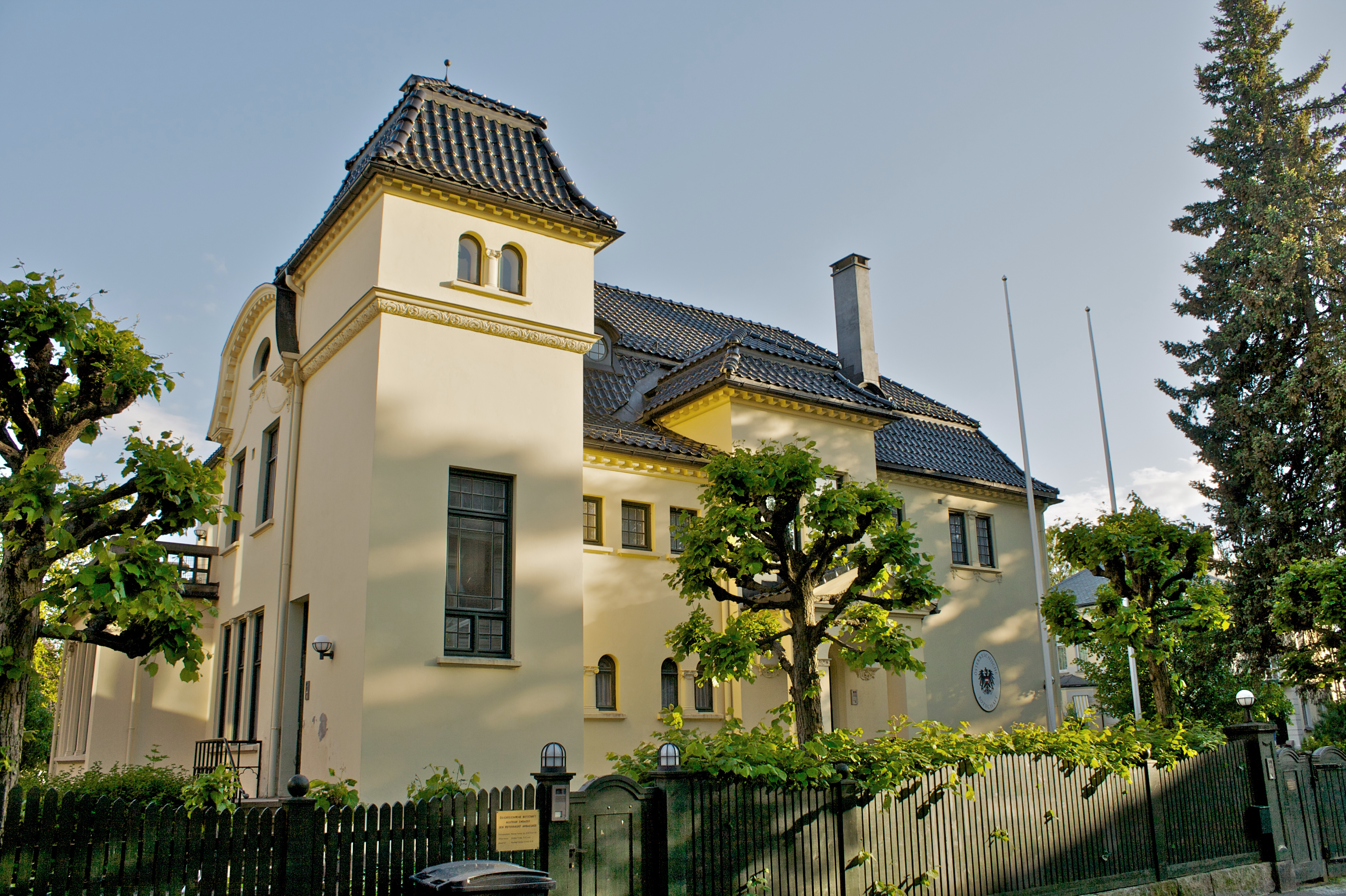 Østerrikes ambassade i Thomas Heftyes gate 21 på Gimle i Oslo.